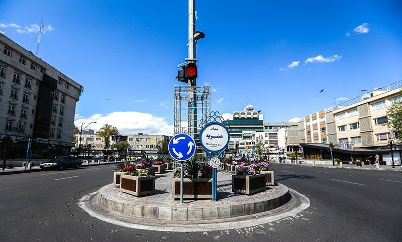 سکوت حاکم بر پایتخت